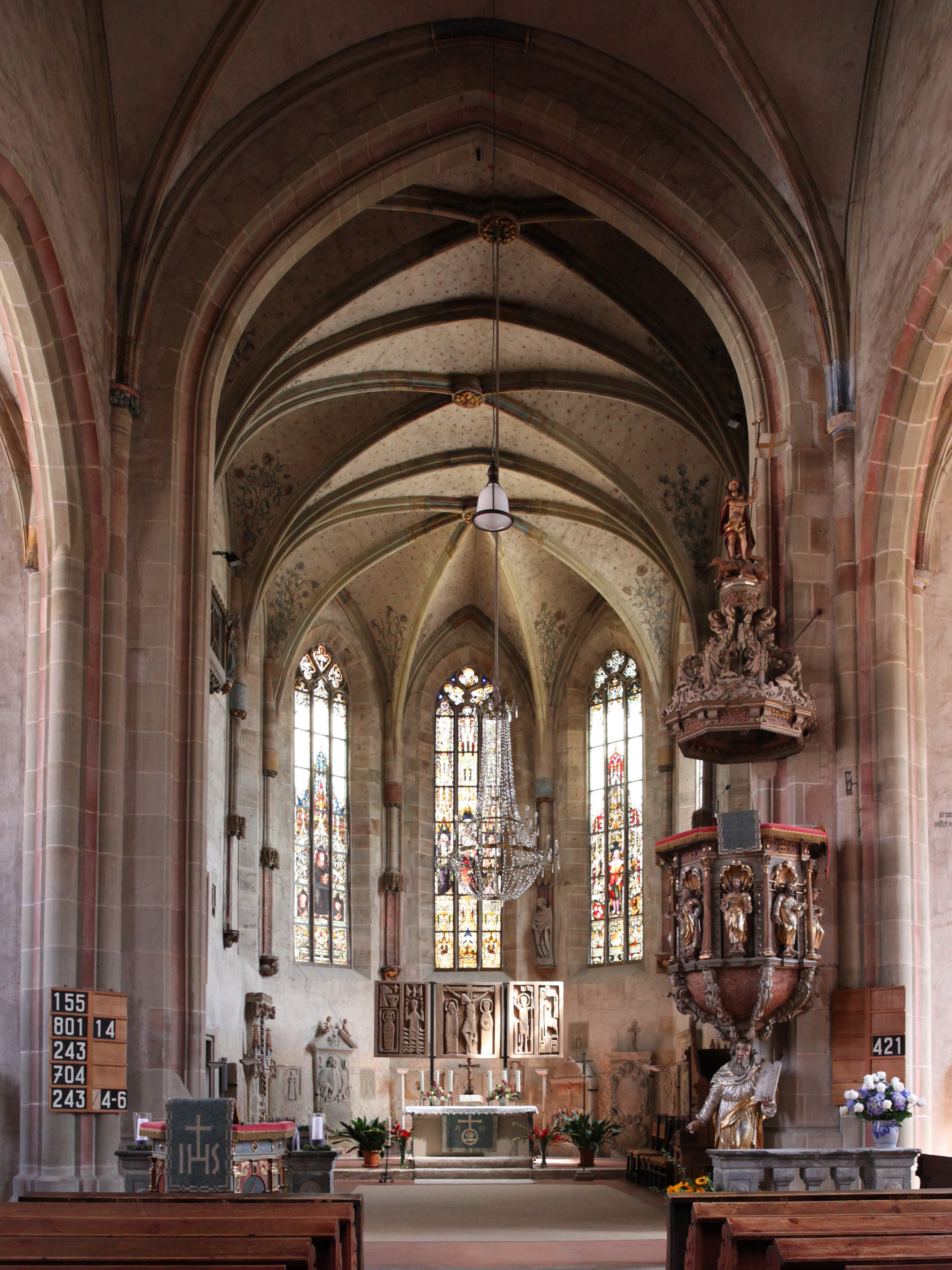 Marienkirche zu Königsberg in Bayern